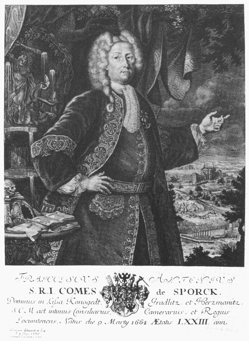 Portrét hraběte Františka Antonína Šporka, rytina E. J. Haase